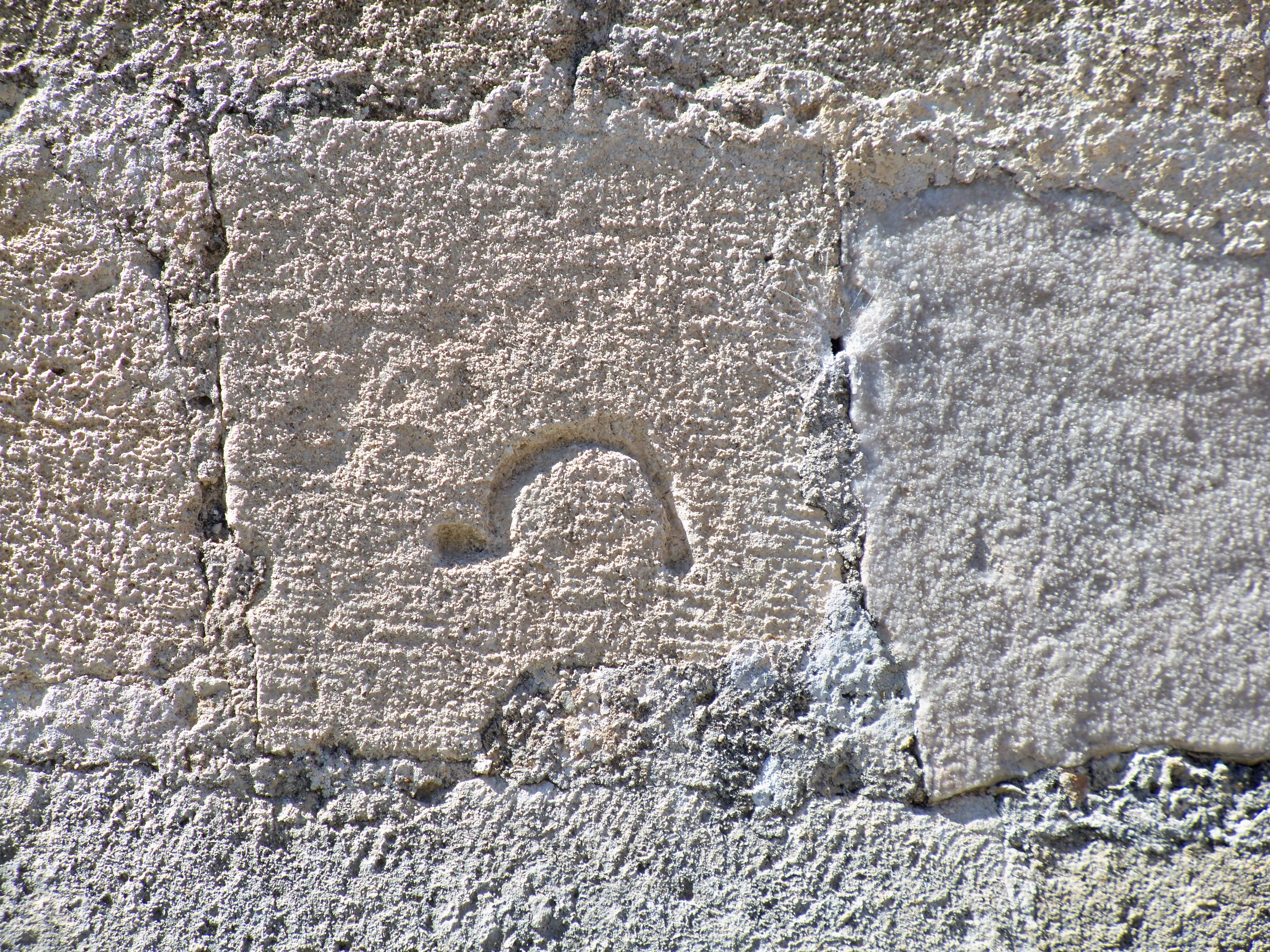 Chapelle Saint-Cosme et Saint-Damien de Gigondas (84) marque de tacheron